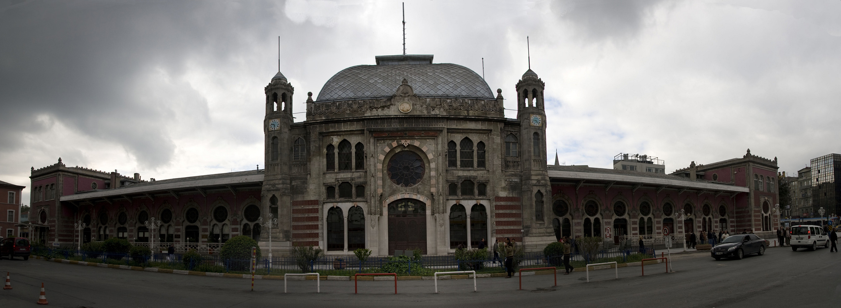 Die Frontansicht des alten Istanbuler Bahnhofs. Das Bild wurde aus drei Einzelbilder zusammengesetzt. Es stellt die alte Front des Bahnhofs dar. Hinter dem alten Gebäude befindet sich der neue Bahnhof. An diesem alten Bahnhof endete die traditionelle Strecke des Orient Express.